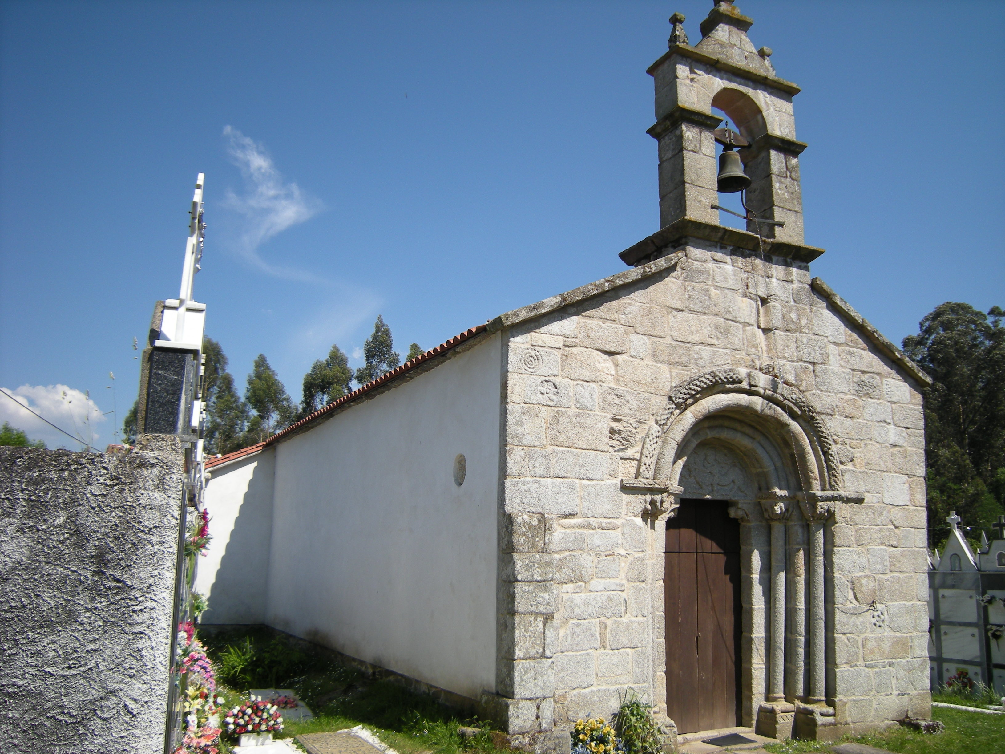 Iglesia de San Martiño de Moldes, Melide